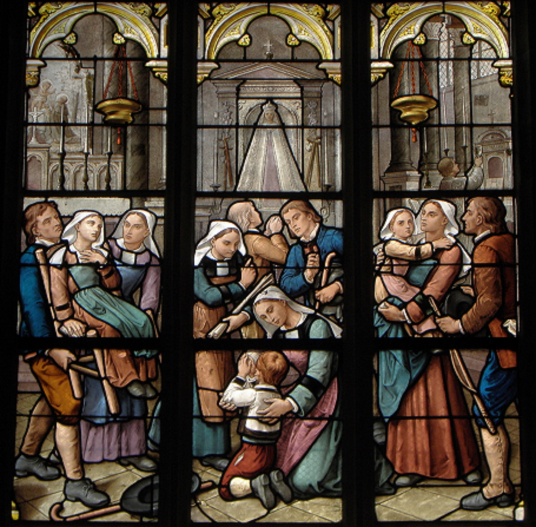 Baie 11 de la basilique Notre-Dame-du-Roncier de Josselin (56). Datation: 1893. Maître-verrier: Ferdinand Hucher et atelier du Carmel du Mans. Description: 2d registre: guérison des épileptiques ou hystériques dites aboyeuses de Josselin.